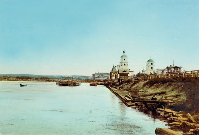 Нижняя набережная Ангары в Иркутске. Конец XIX века. Оцветнённая фотография.